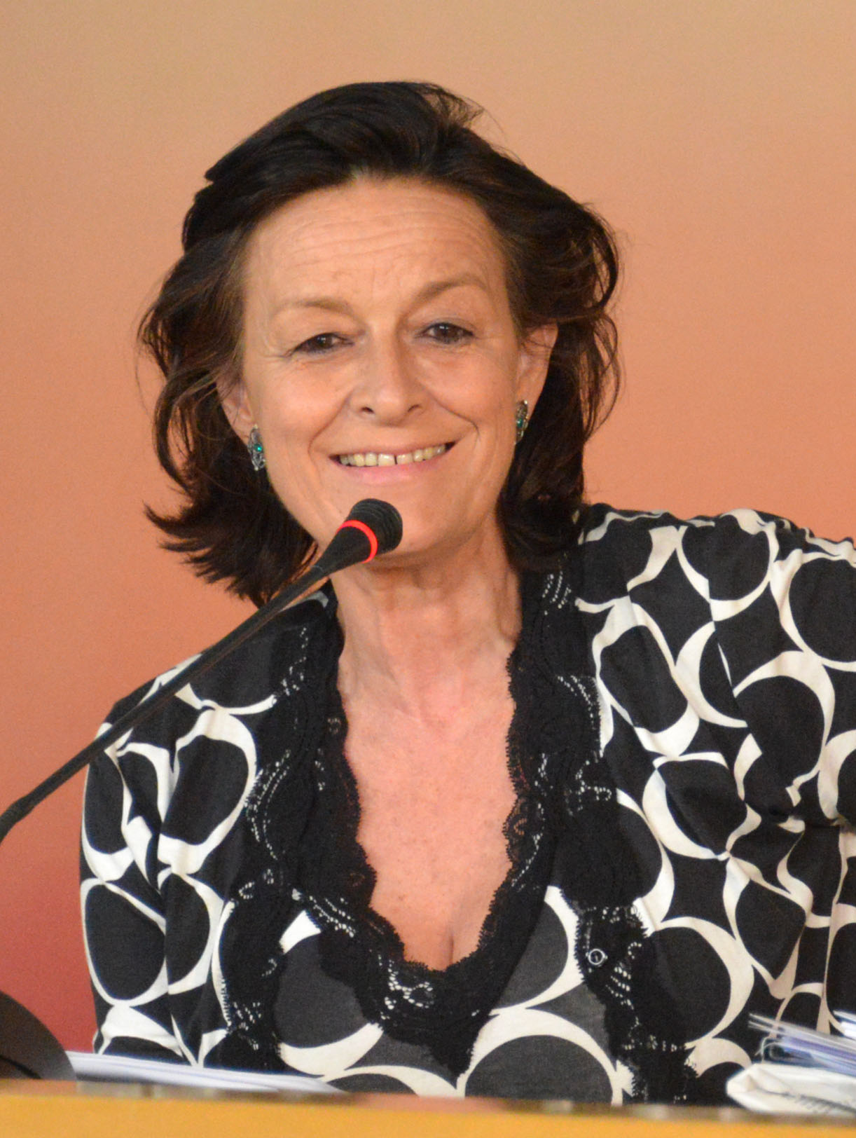 El portavoz del PSOE en el Ayuntamiento de Madrid, Jaime Lissavetzky, ha comparecido ante los medios junto a los ediles Pedro Zerolo, Noelia Martínez, Diego Cruz y Ruth Porta para explicar las preguntas y proposiciones que presentarán el grupo municipal en el pleno del mes de septiembre.